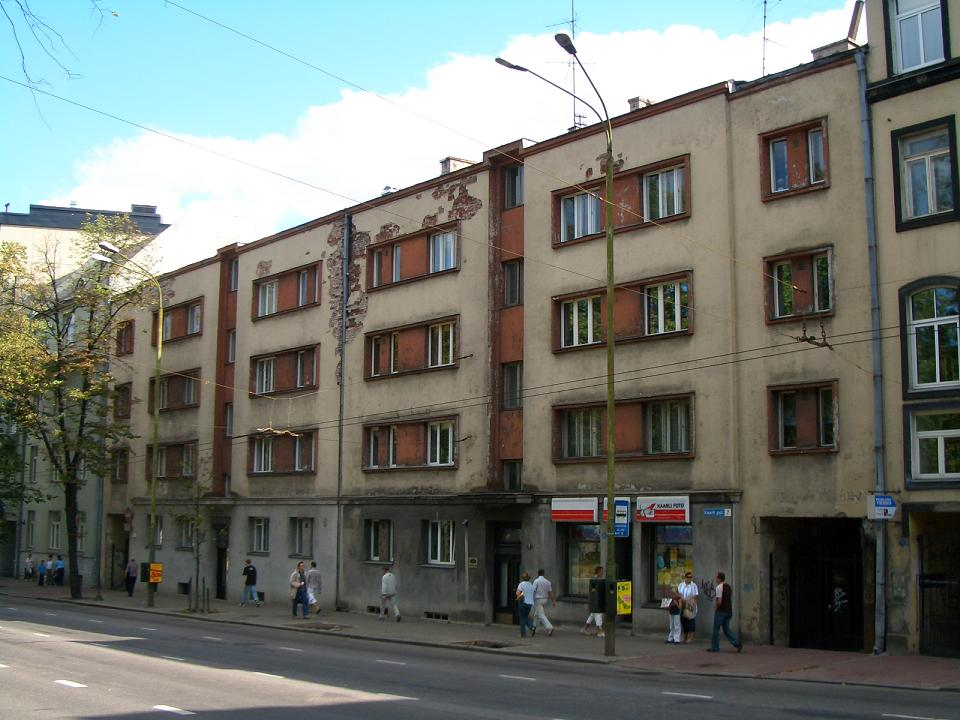 Kaarli pst 5/7, Tallinn